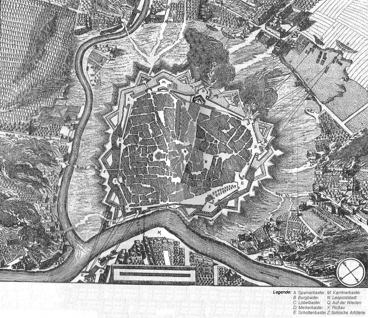 2. Türkenbelagerung; Wien